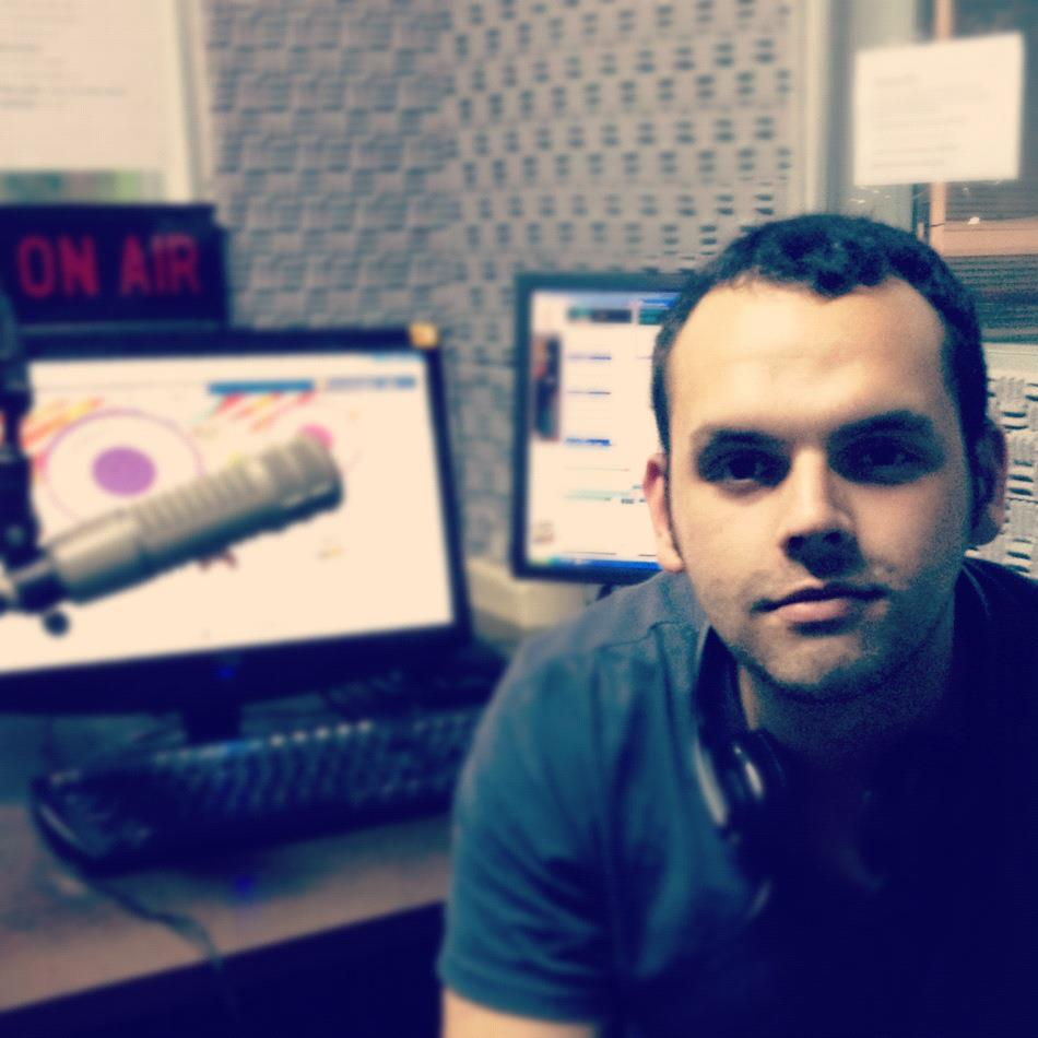 Imágen de Paul Landó, youtuber y autor paraguayo, en Radio Estación 40 de Paraguay.